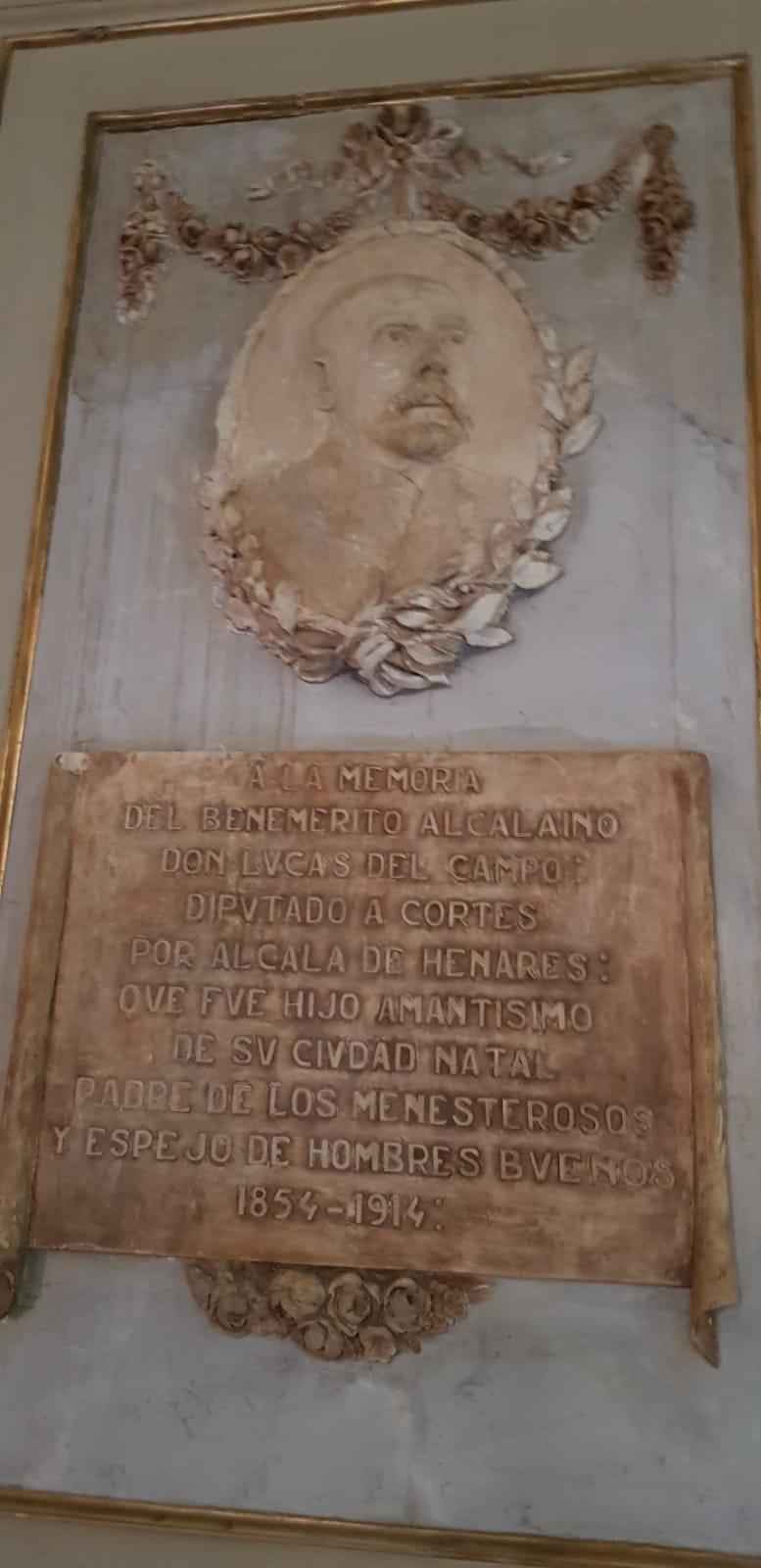 Placa conmemorativa dedicada a Lucas del Campo y Fernández existente en el salón de plenos del Ayuntamiento de Alcalá de Henares